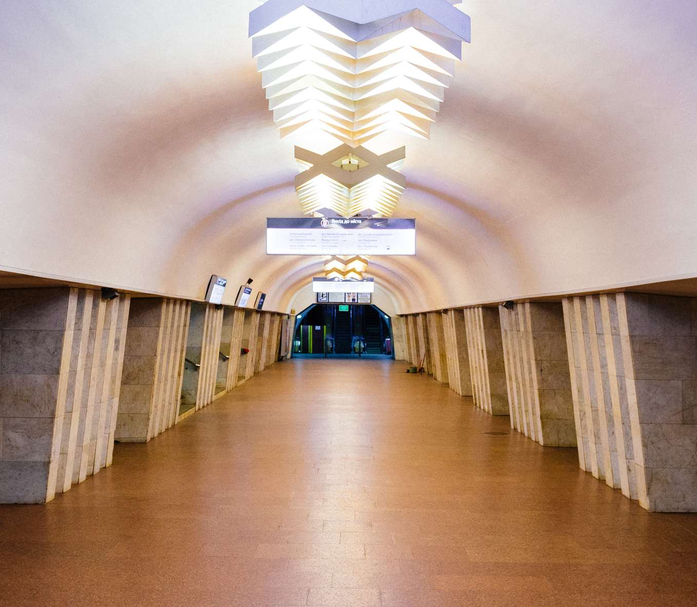 Площадь Конституции